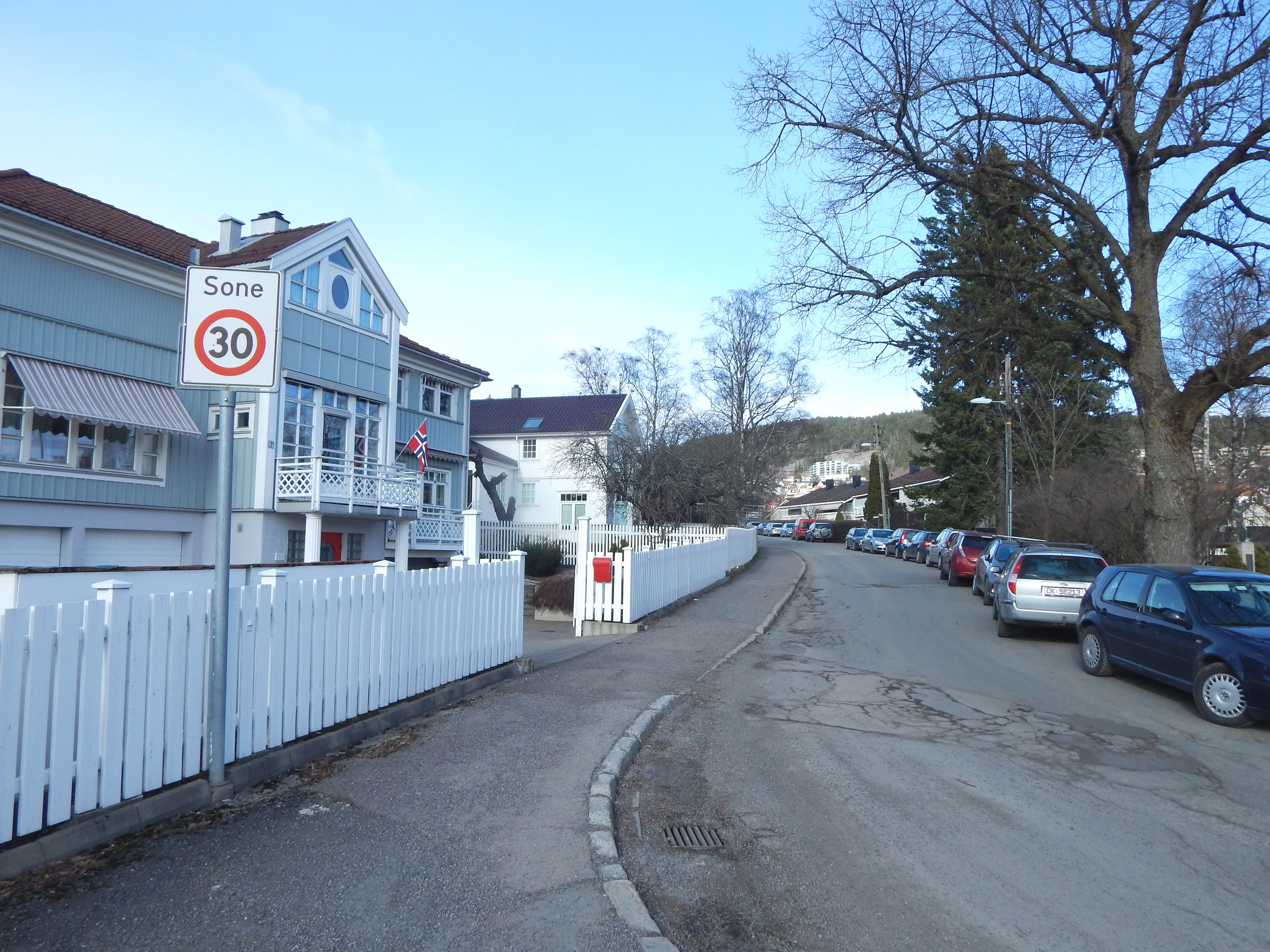 Grefsen allé like ved Grefsenveien